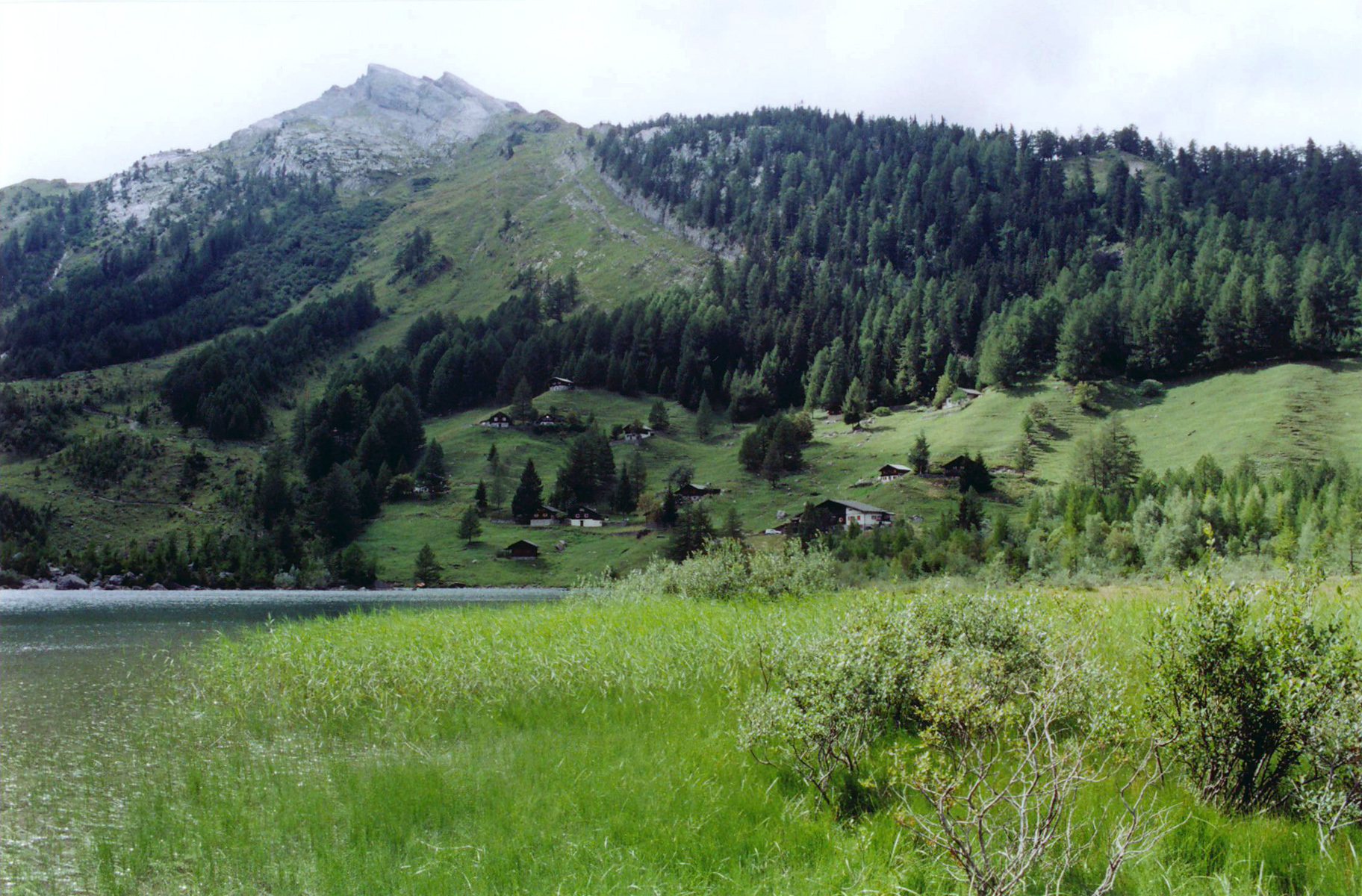 Lac de Derborence (Aout 2006)